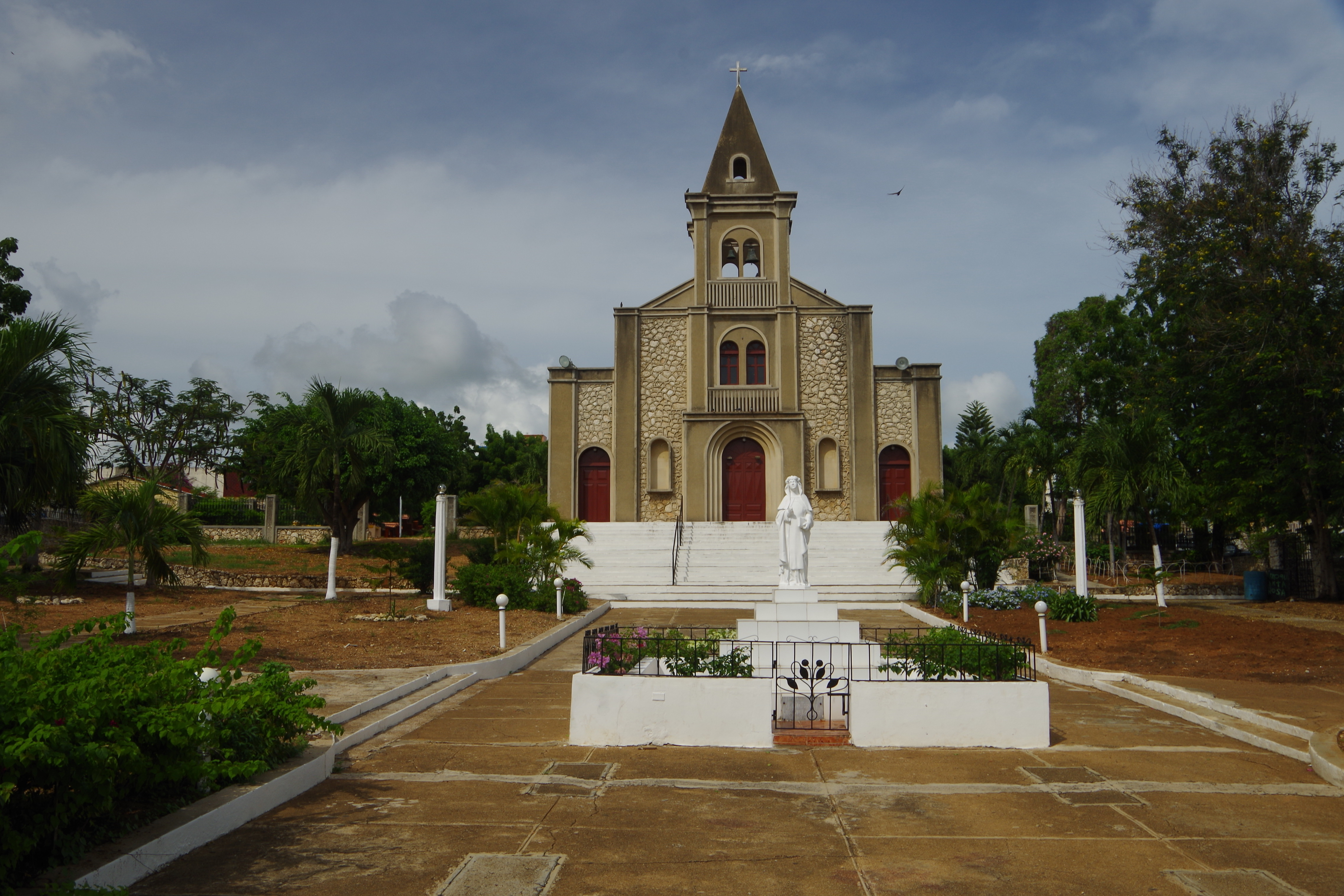 Kirche Santa Rosa, La Romana